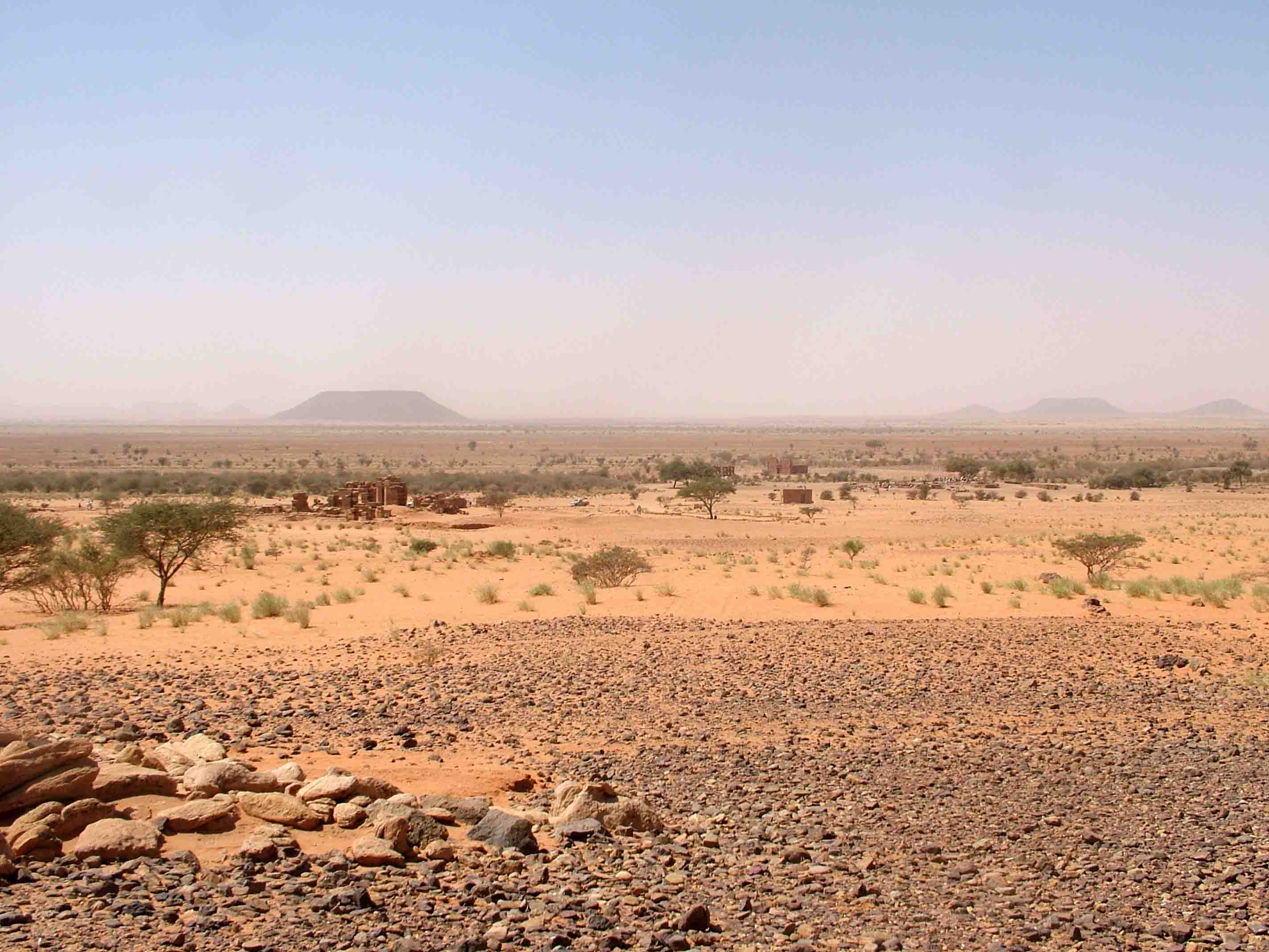 Butana-Nubia